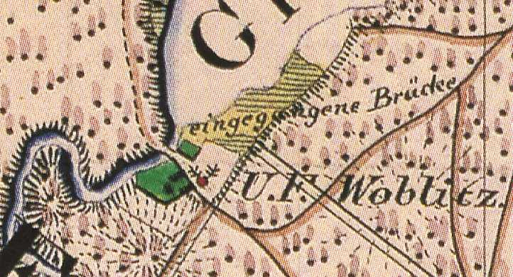 Woblitz, Wohnplatz von Himmelpfort, Ortsteil von Fürstenberg/Havel, Lkr. Oberhavel, Brandenburg, Ausschnitt aus dem Urmesstischblatt Blatt 2845 Bredereiche von 1825